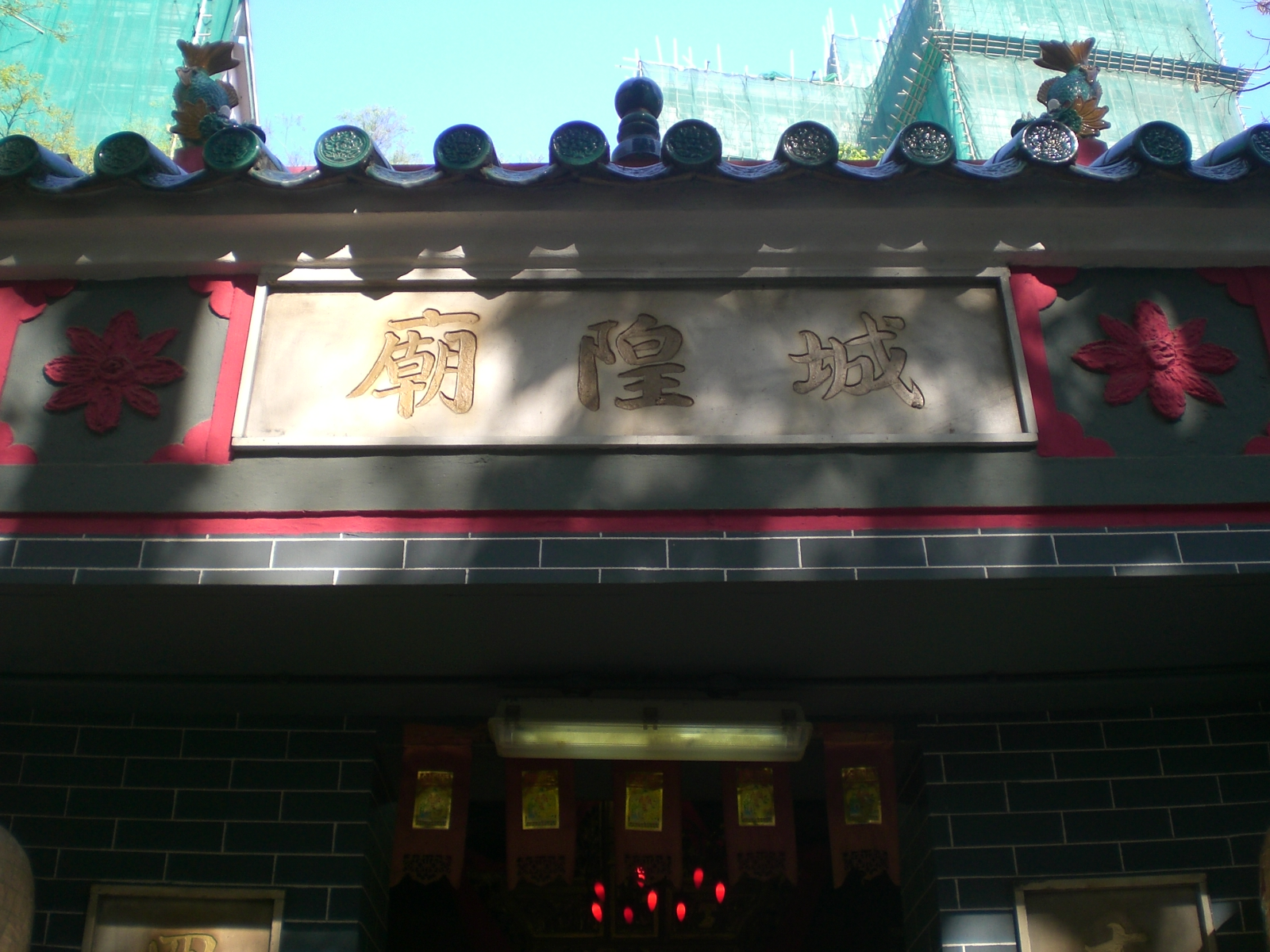 筲箕灣城隍廟, 筲箕灣金華街 Shau Kei Wan Shing Wong Temple, Kam Wah Street, Hong Kong